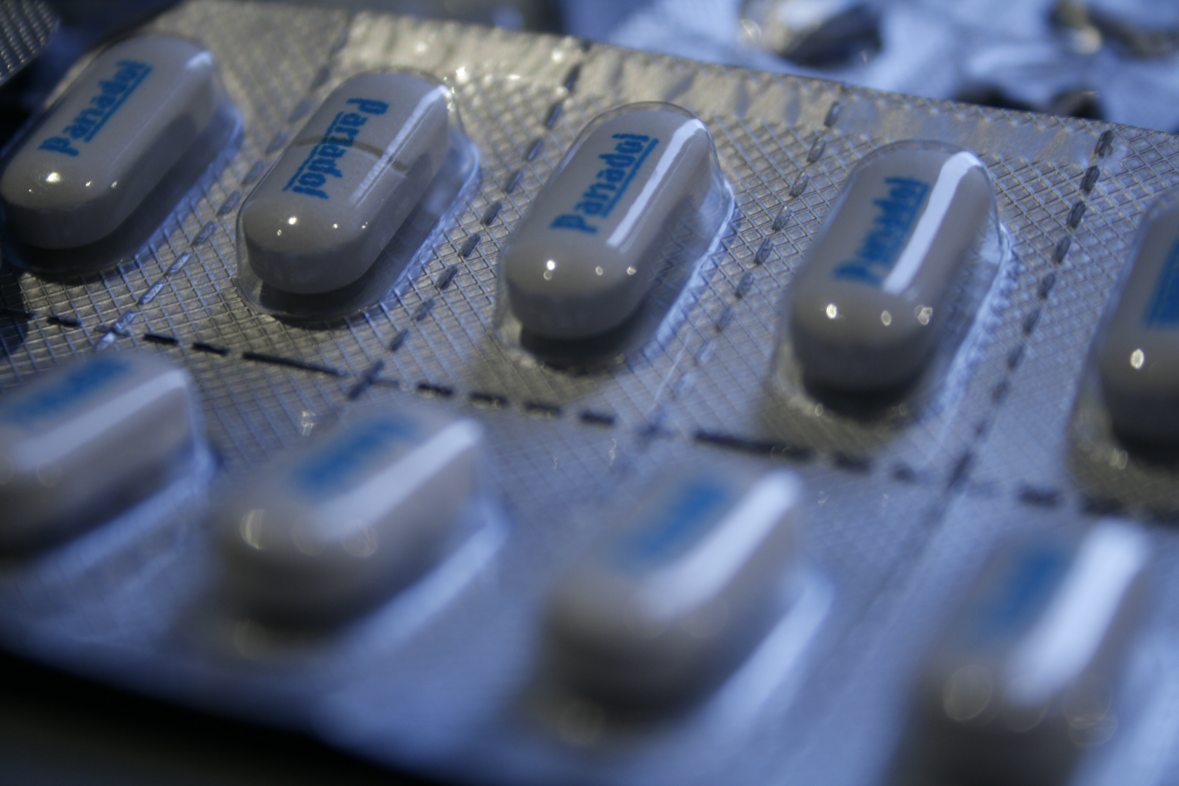 Panadol pill package closeup